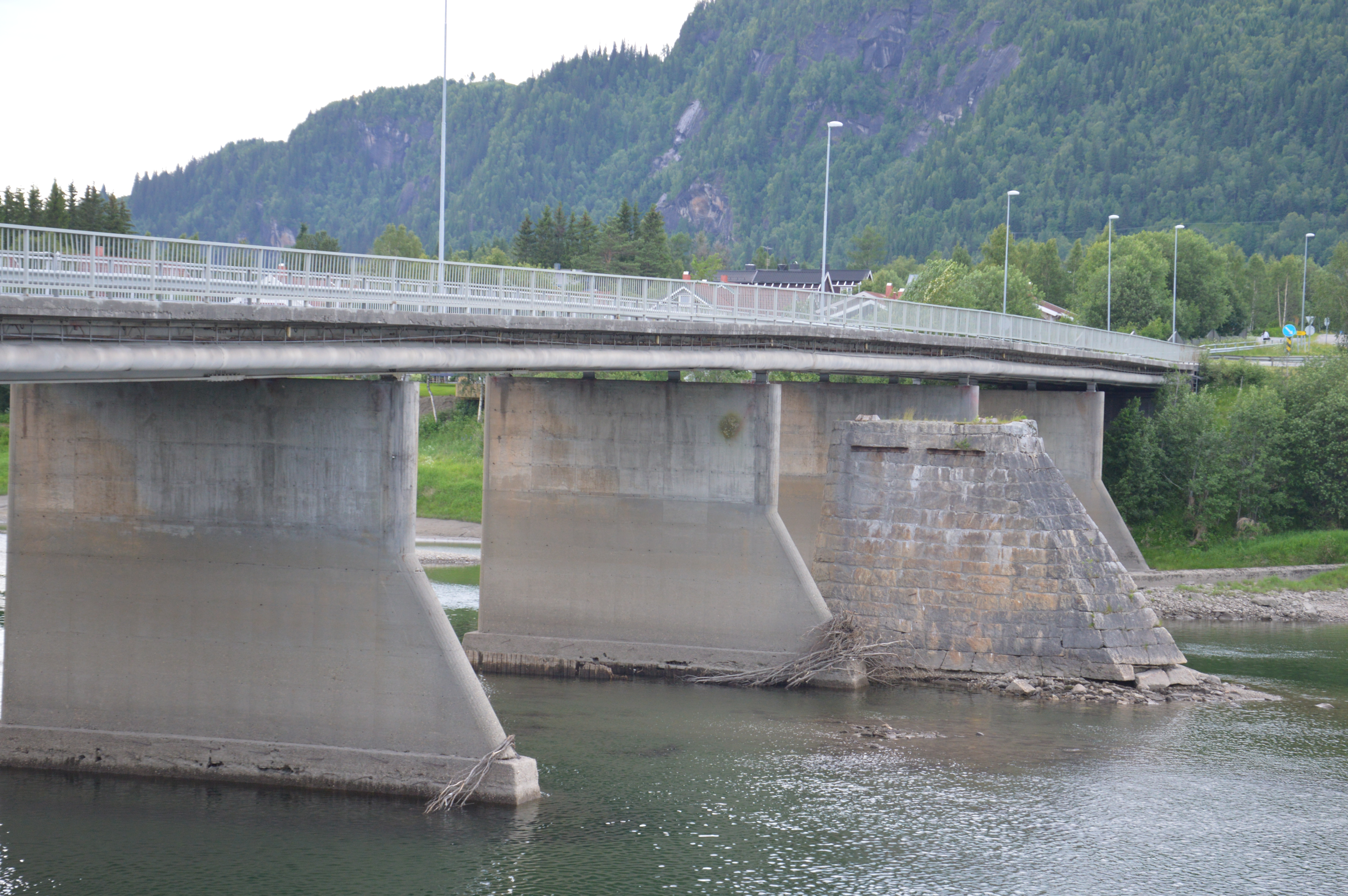 Selfors bridge in Mo i Rana seen from Tverrånes (south)